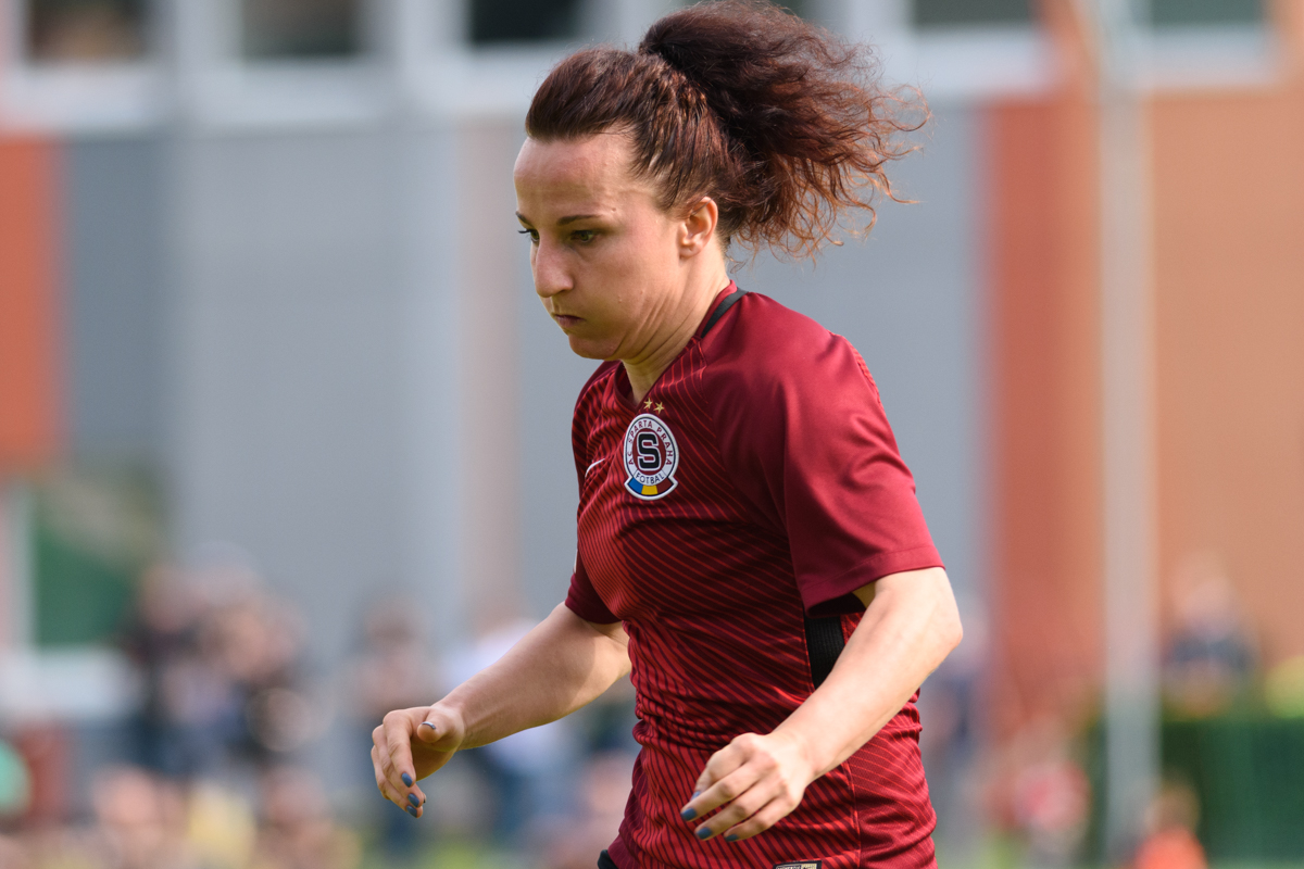 Petra Vyštejnová during the 2019 Czech Cup Final